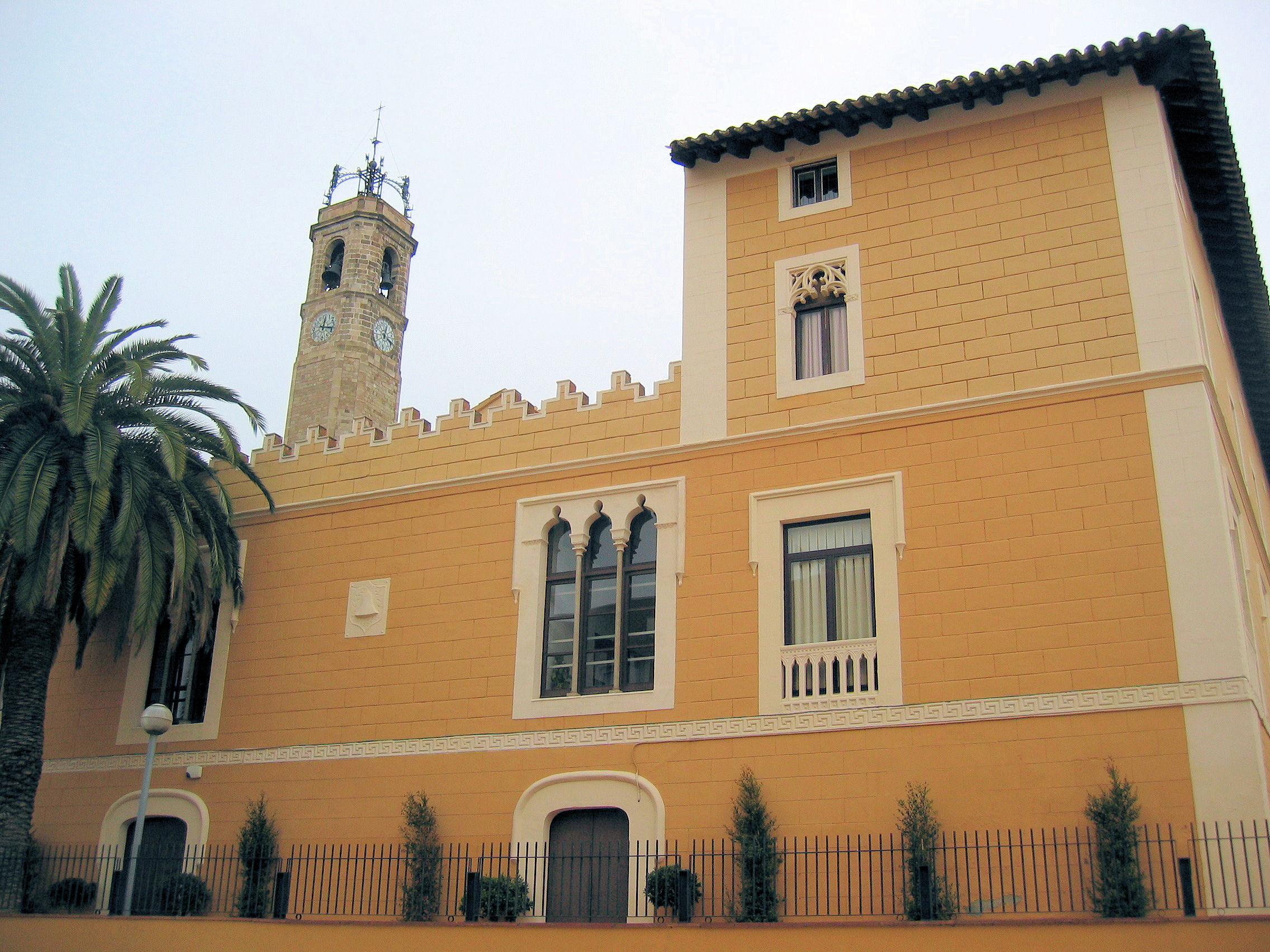 Badalona - Torre Vella i Campanar